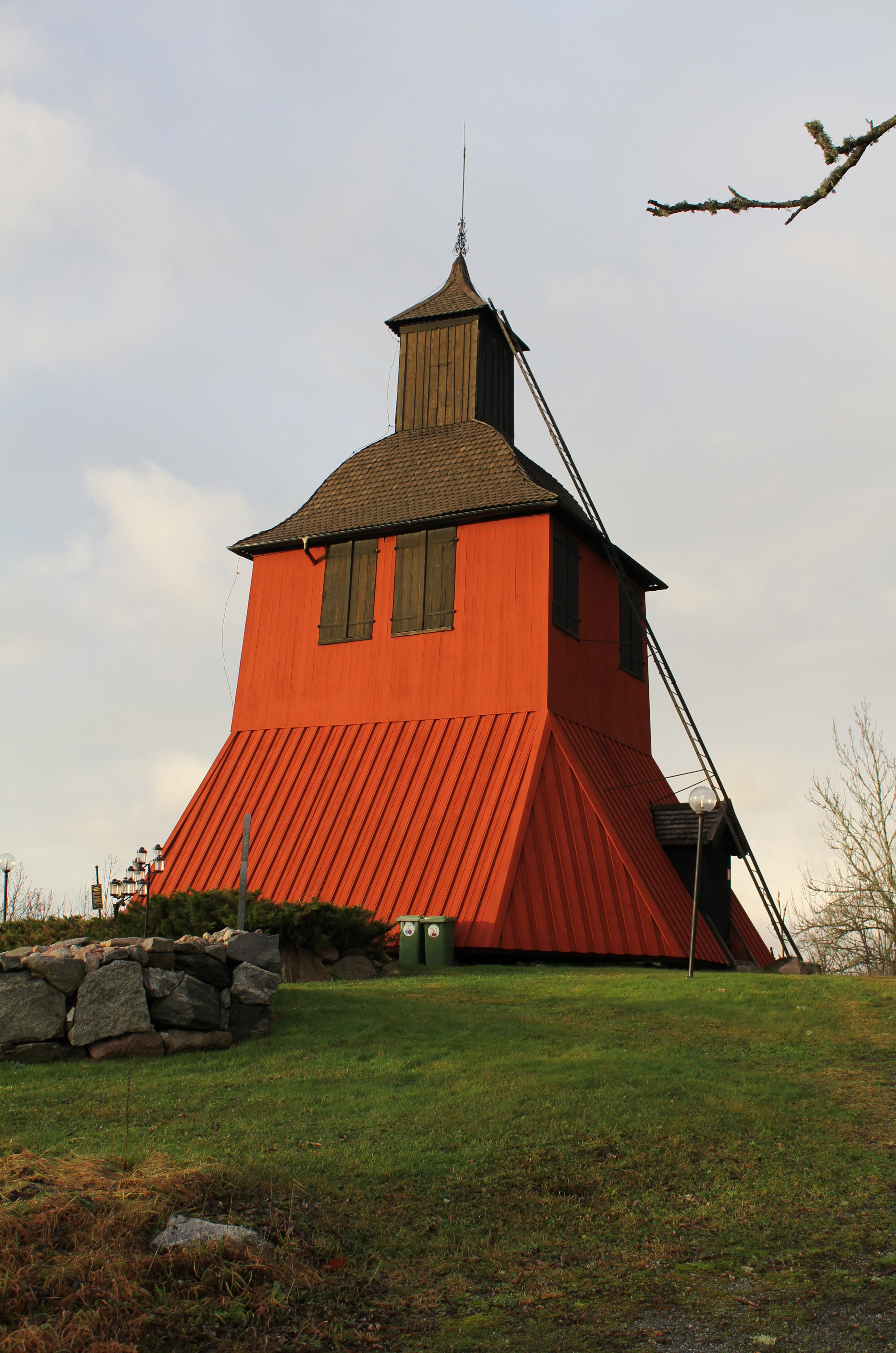 Roslags-Bro kyrka i Norrtälje kommun. Klockstapel.